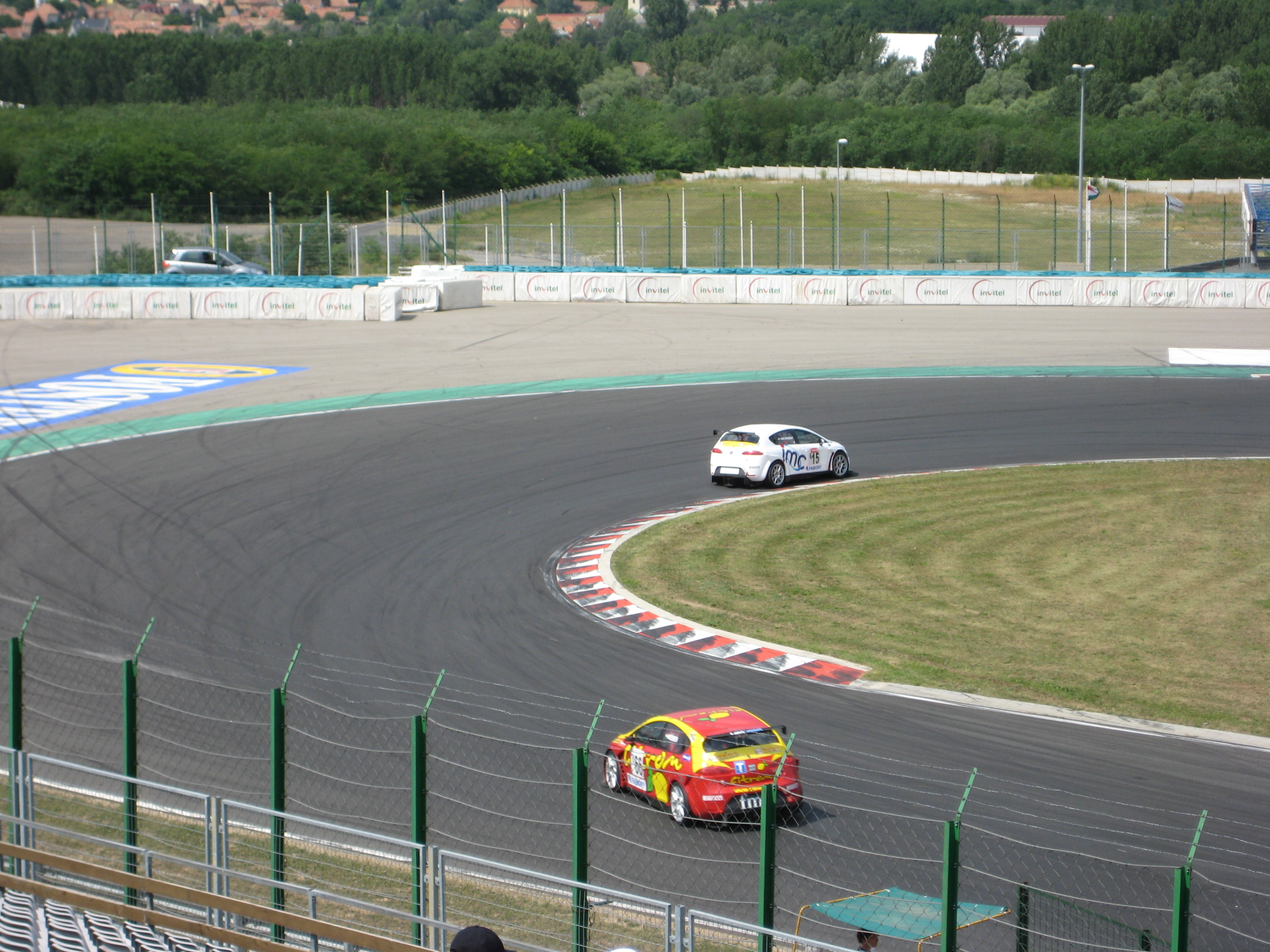 Hungaroring-Material Kupa 07 Wéber VS Kiss